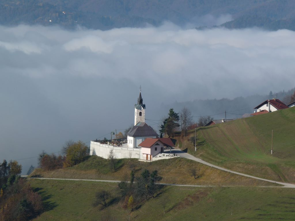 Sv. Mohor in Fortunat na Libergi